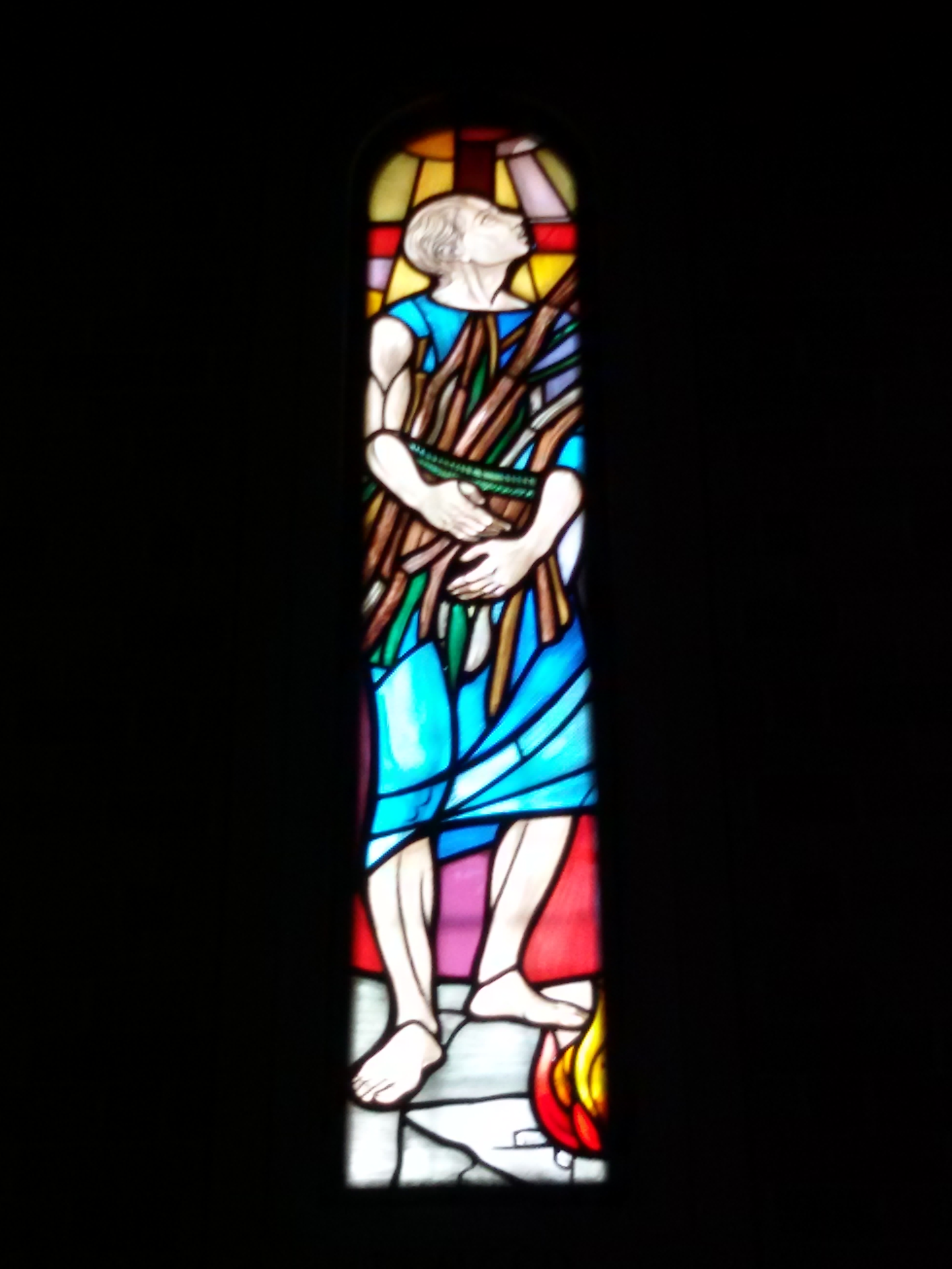 vetrata